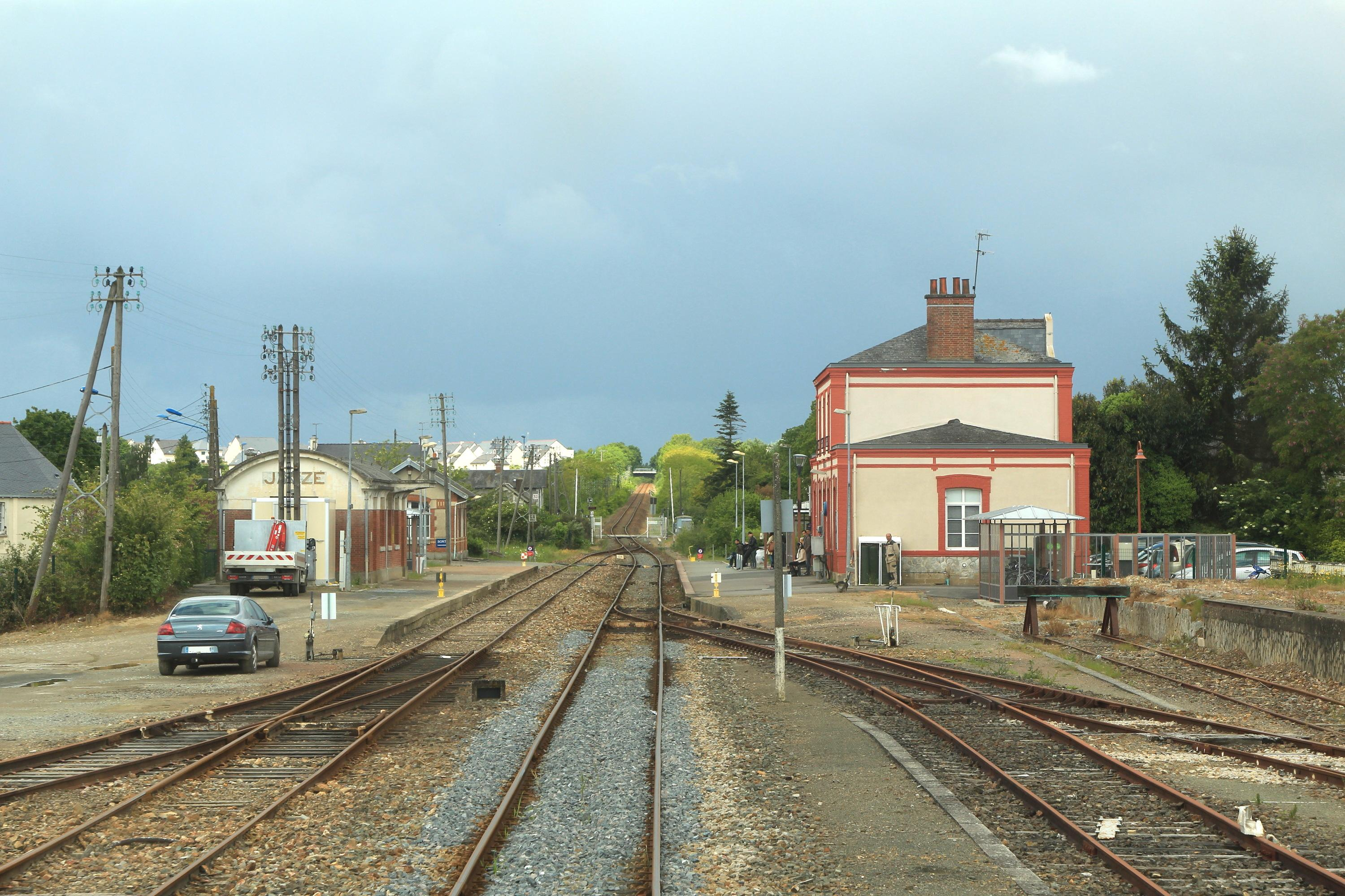 Vue des voies et du bâtiment voyageurs de la gare de Janzé.